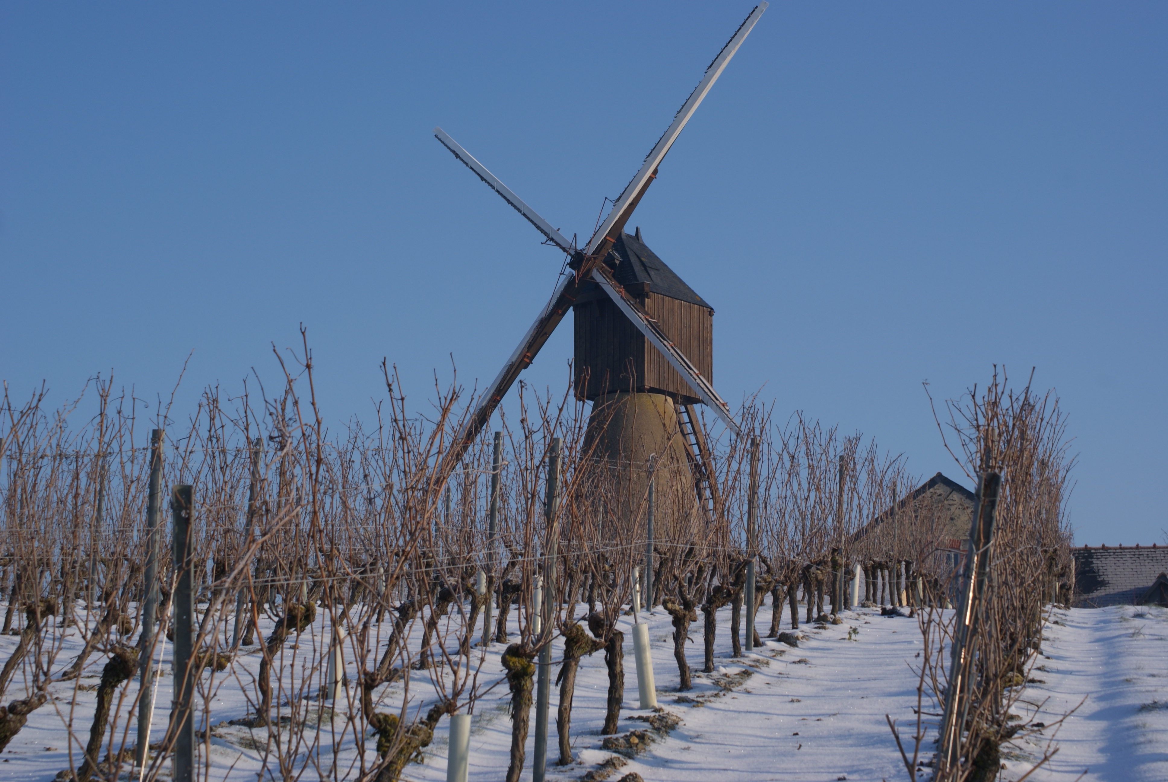 Moulin à vent de type cavier, Faye d'Anjou